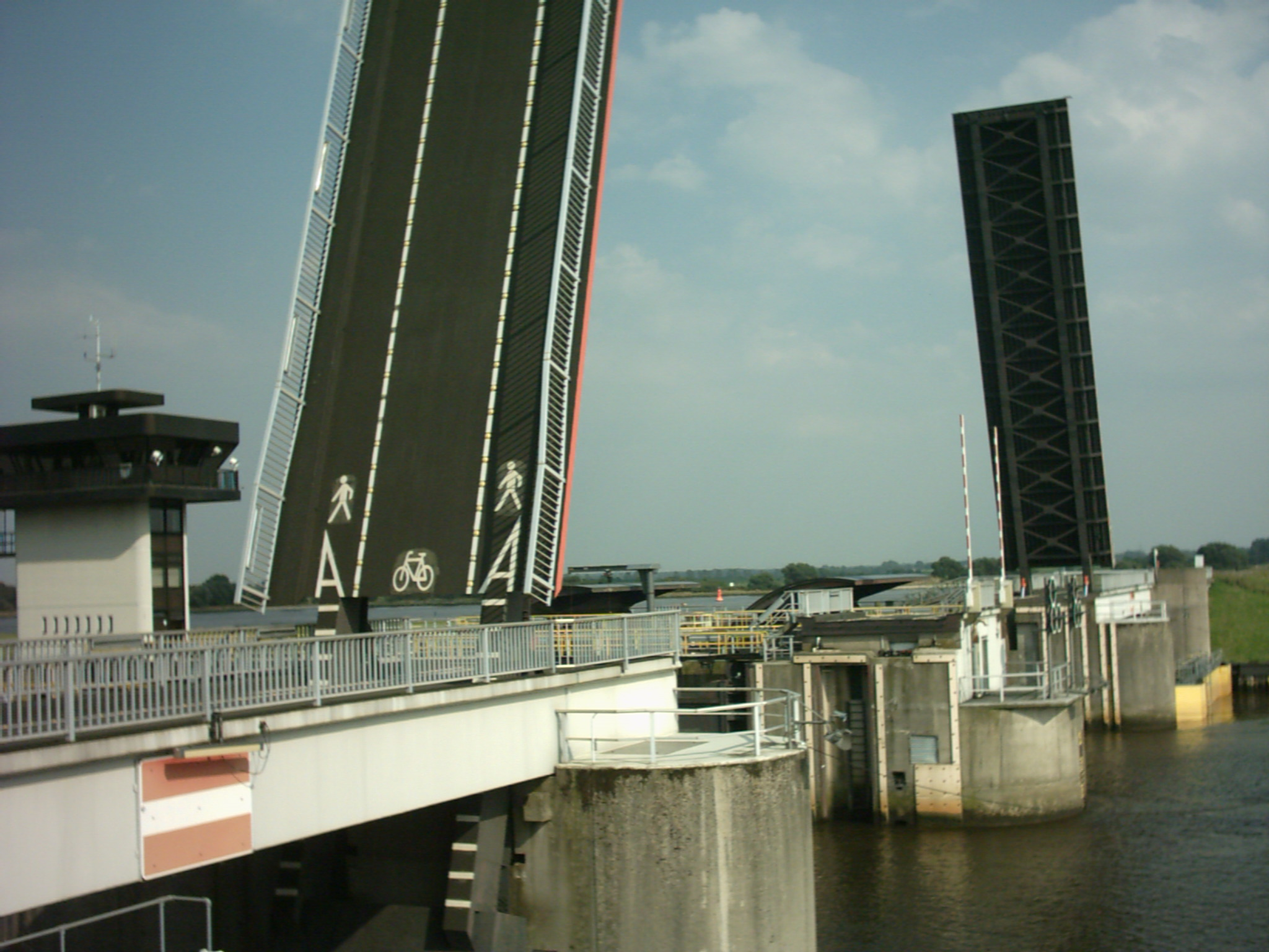 Huntesperrwerk bei Elsfleth Fotograf: presse03 selbst Fotografiert 8/2005 Lizenz: GNU-FDL